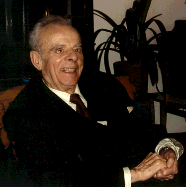 Reżyser radiowy Wojciech Maciejewski w 2010 roku.